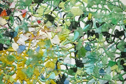 Sacs plastique tressés